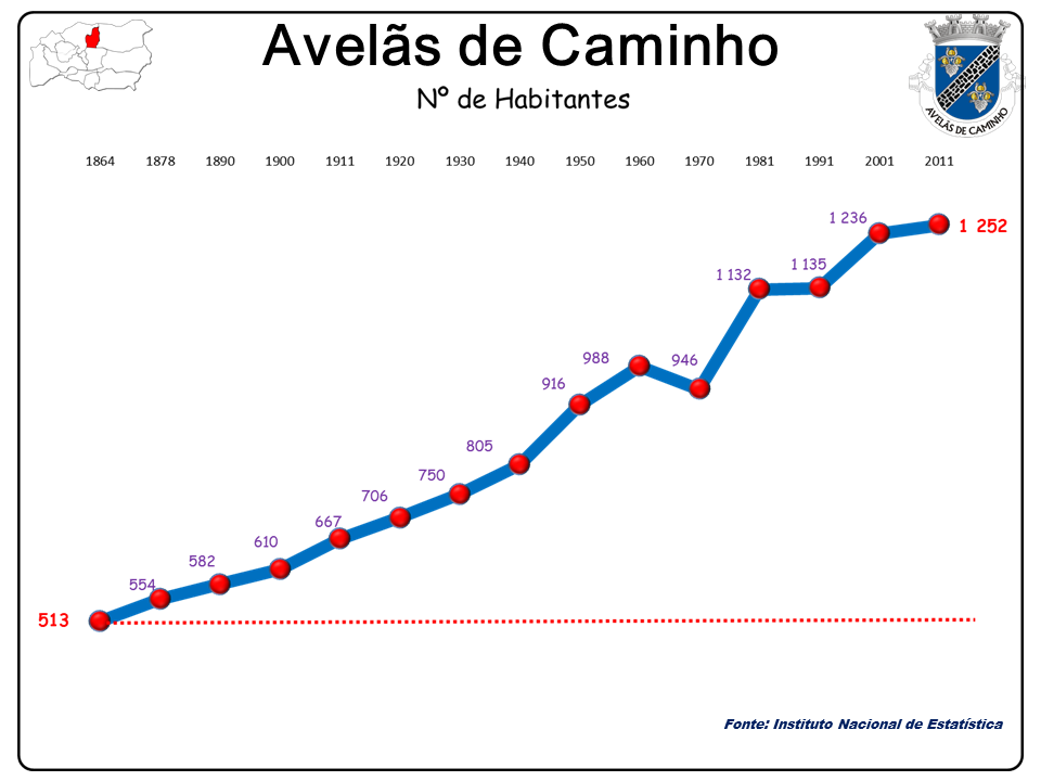 Freguesia